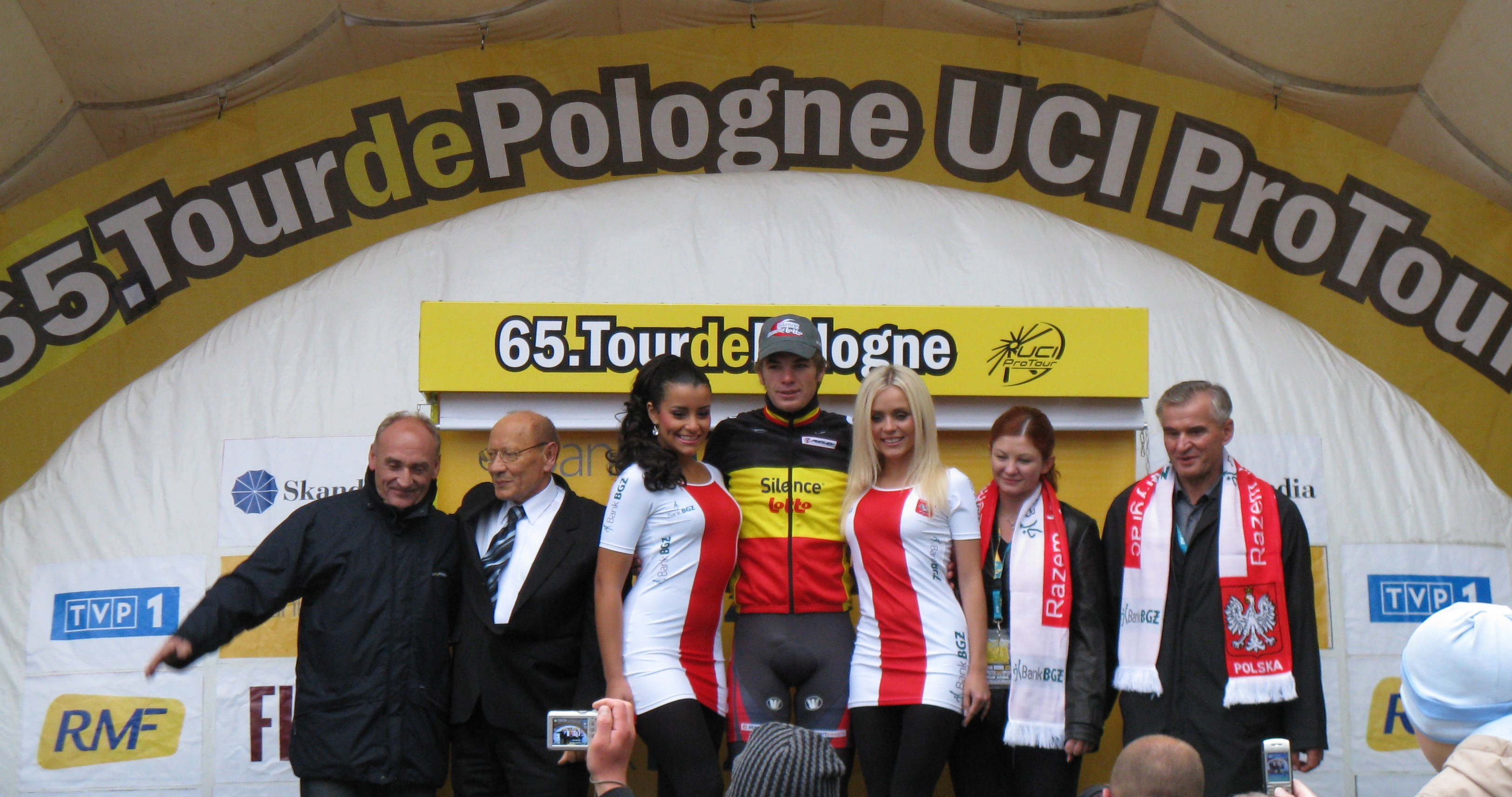 Jürgen Roelandts w Rzeszowie na mecie 5. etapu Tour de Polonge 2008